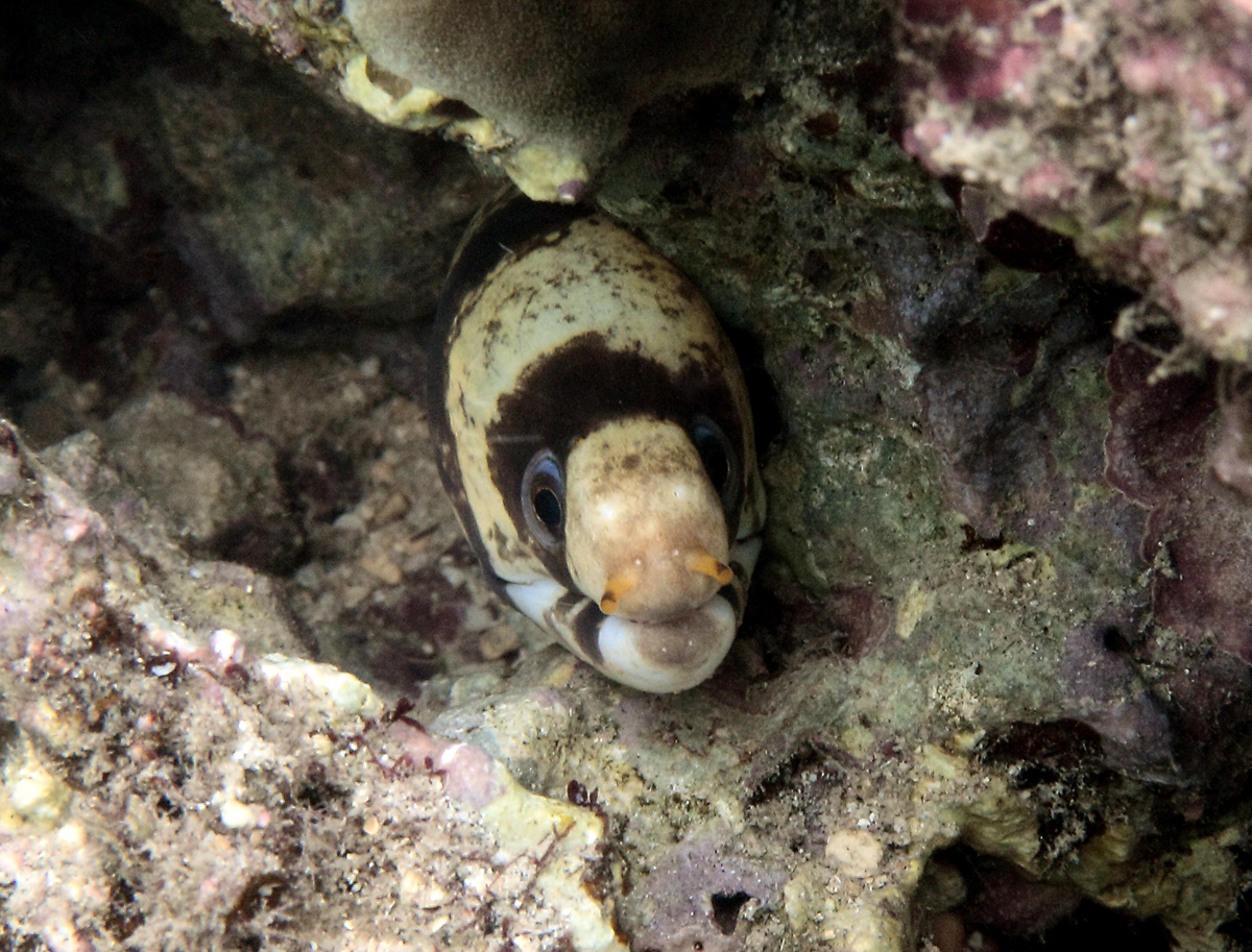 Une murène à barres (Echidna nebulosa) à la Réunion.